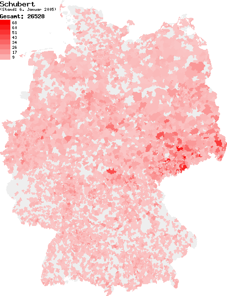 Verteilung des Nachnamens Schubert in Deutschland nach dem Telefonbuch mit Stand vom 6. Januar 2005